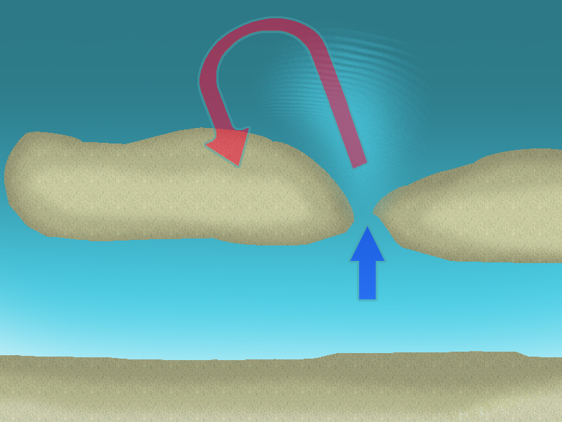 Een muistroom is een stroming in het water nabij de kust, die zeewaarts gericht is. De stroming vindt met name plaats in de openingen tussen de zandbanken of de diepere gedeeltes op het strand.